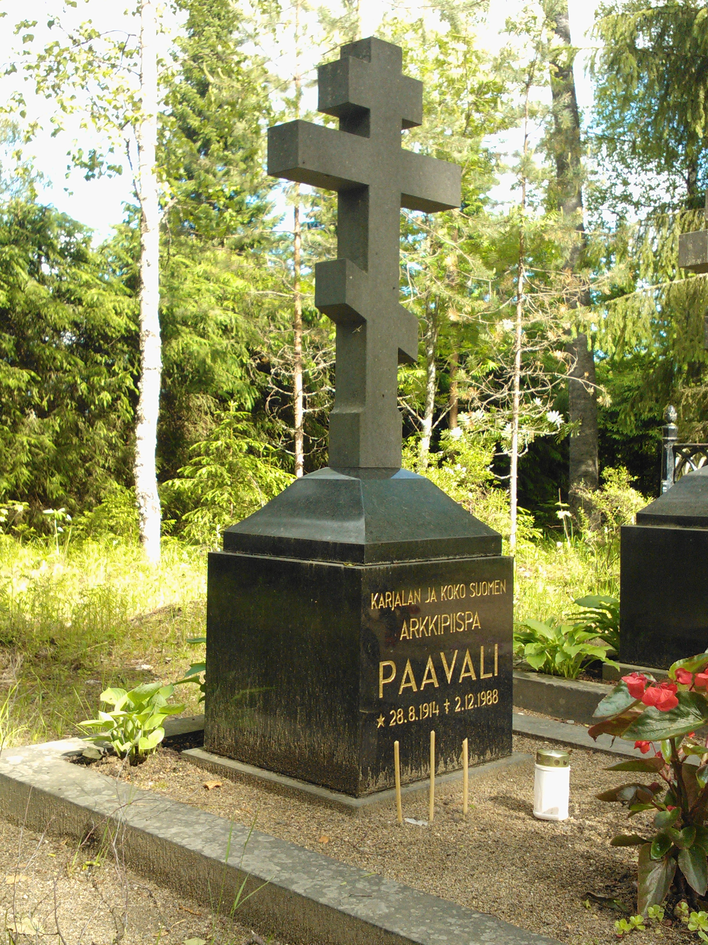 Могила архиепископа Павла (Гусева-Олмари) на кладбище Ново-Валаамского монастыря